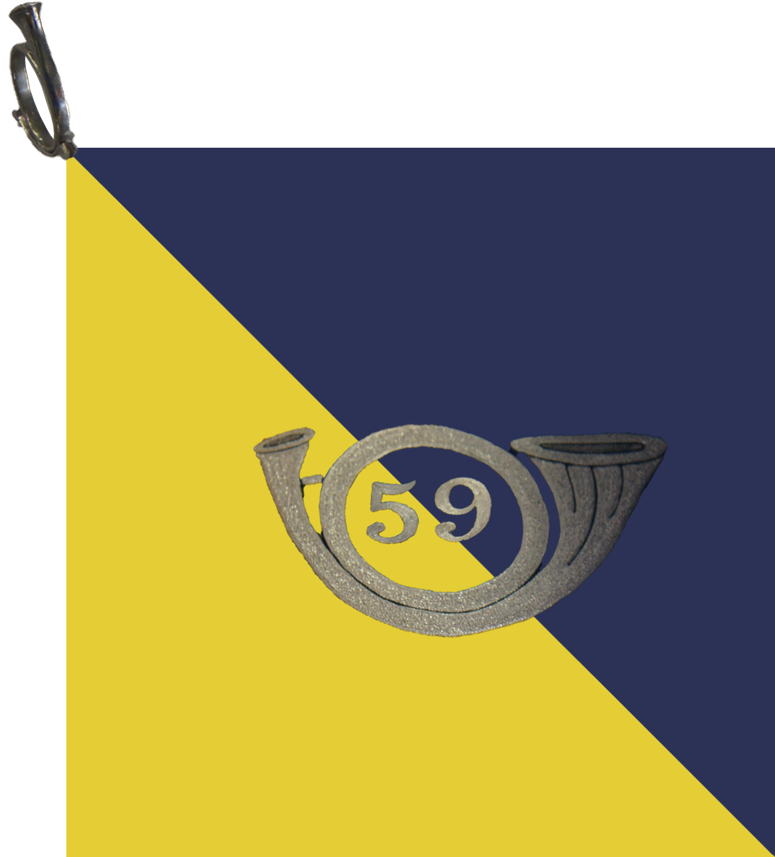 Fanion du 59e bataillon de chasseurs Musée Émile Driant .